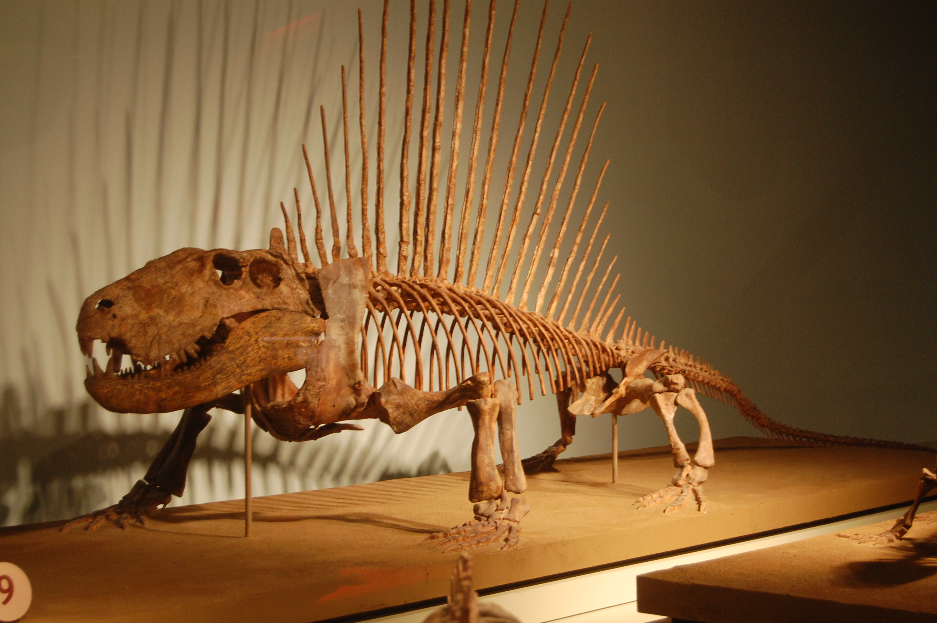 Dimetrodon